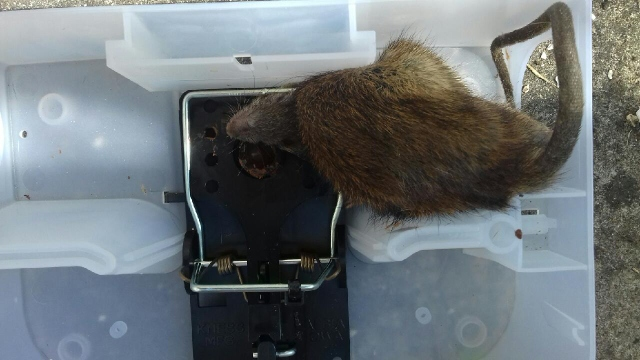 Photo d'un piège à rat sécurisé, dit "sécuriposte", placé en extérieur, déclenché par le rat. ©